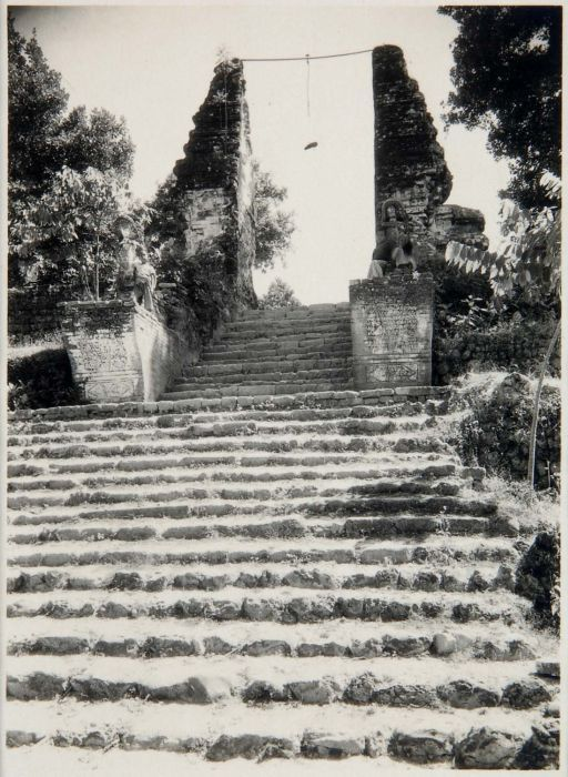 Foto. De gespleten poort bij het graf van Sunan Giri